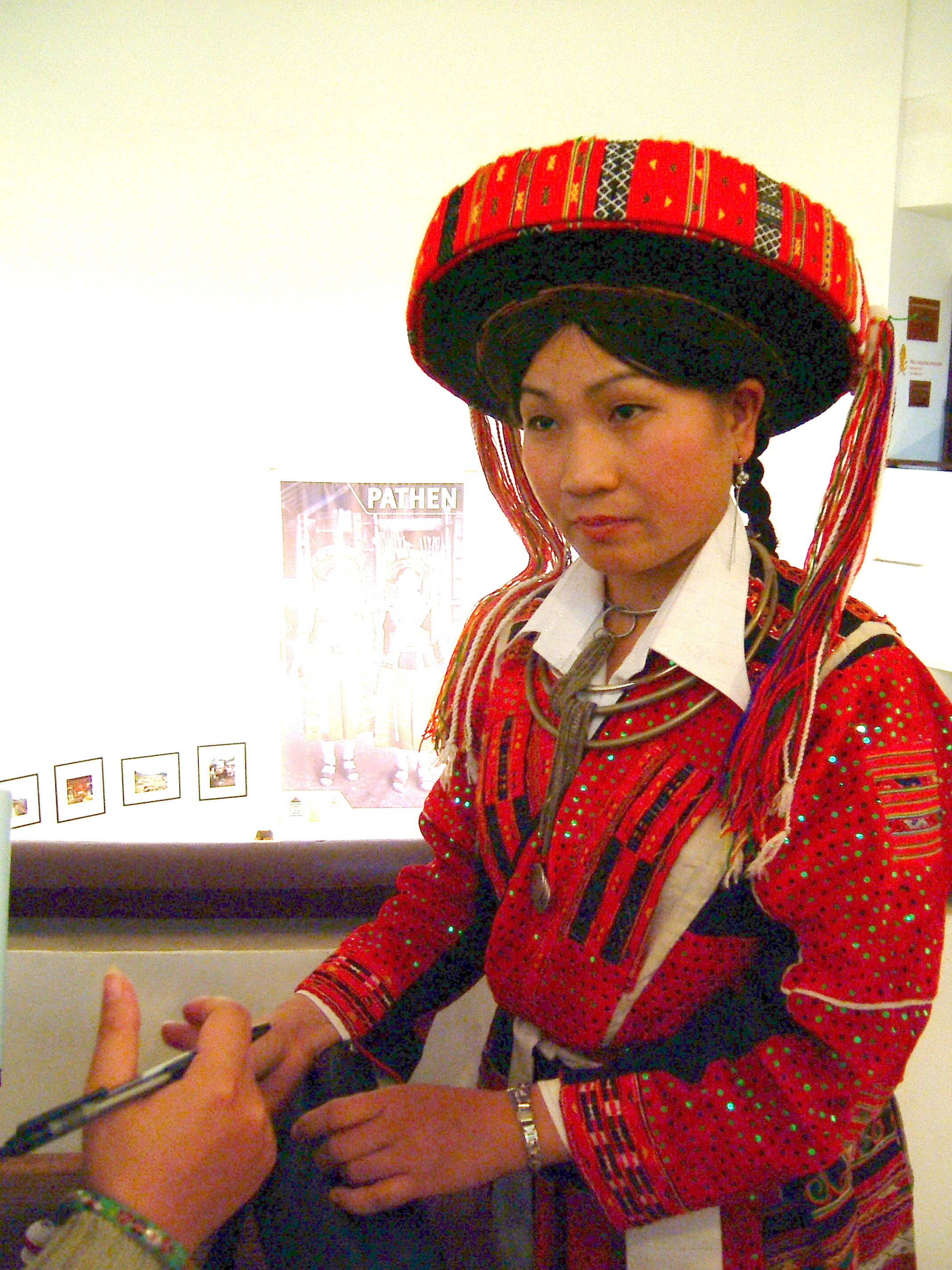 A Pà Thẻn lady